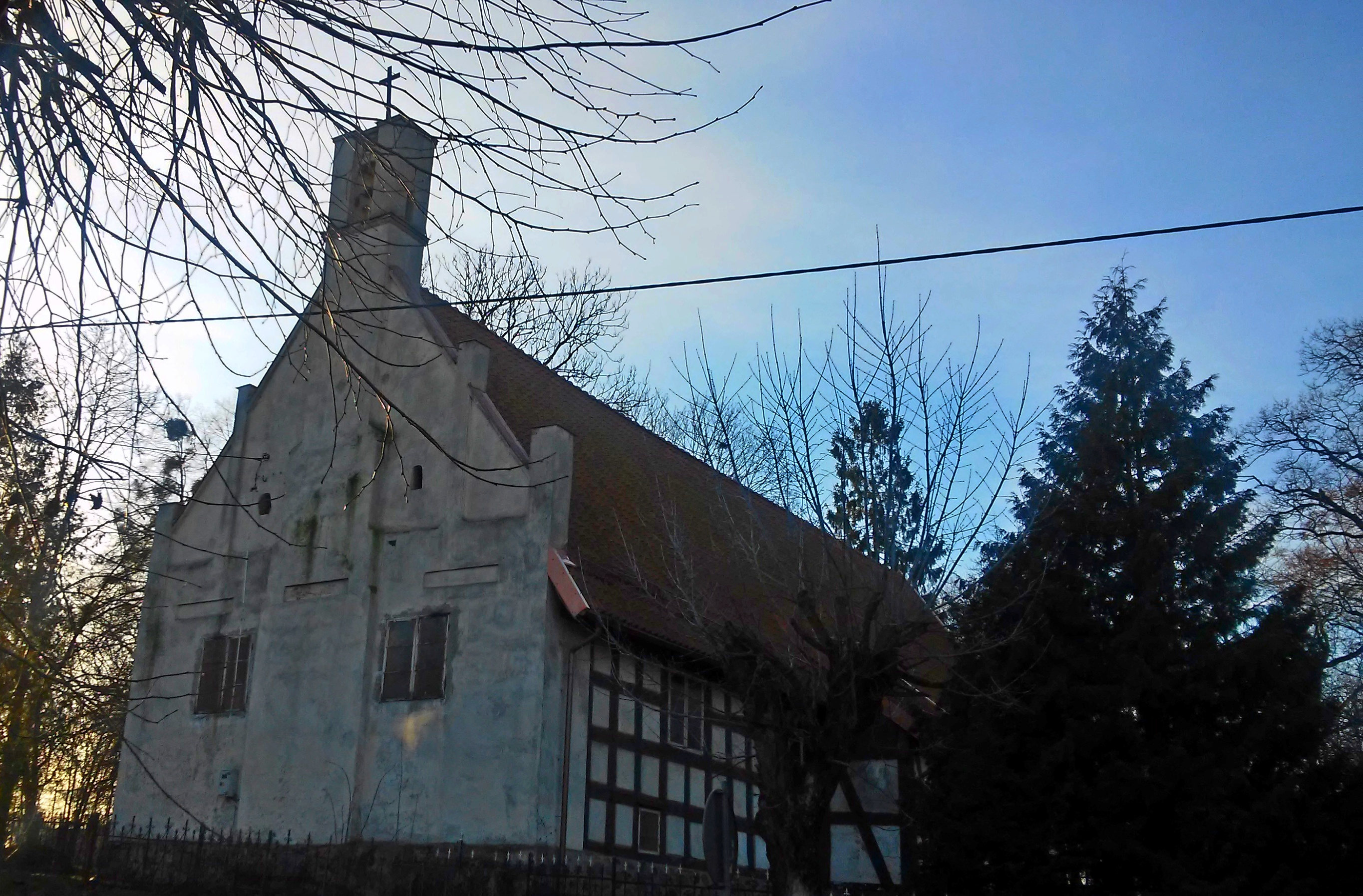 Kościół św. Jerzego (cerkiew św. Onufrego) w Pasłęku, stan z końca 2015, widok od ul. Bohaterów Westerplatte